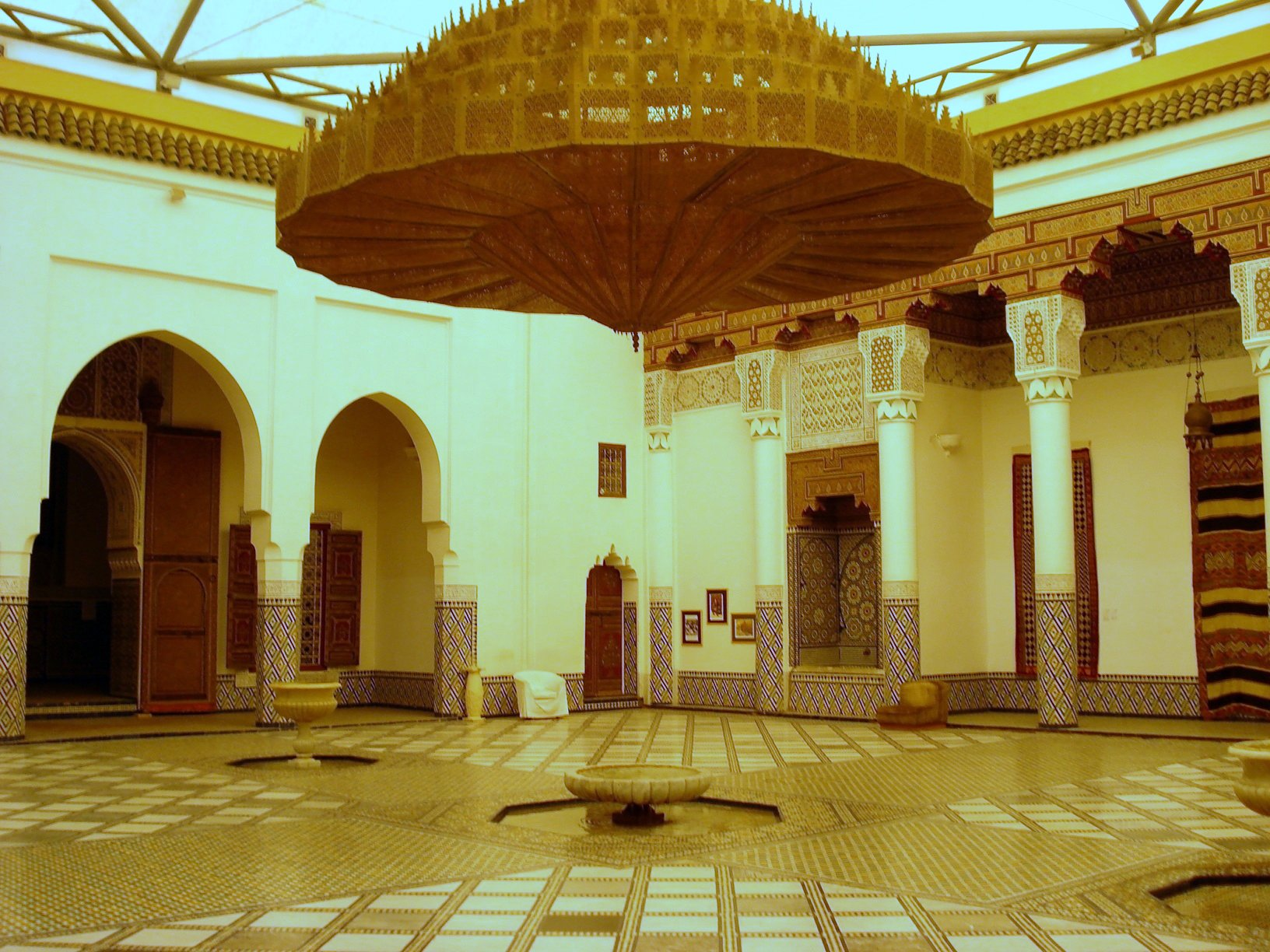 Marrakech museum